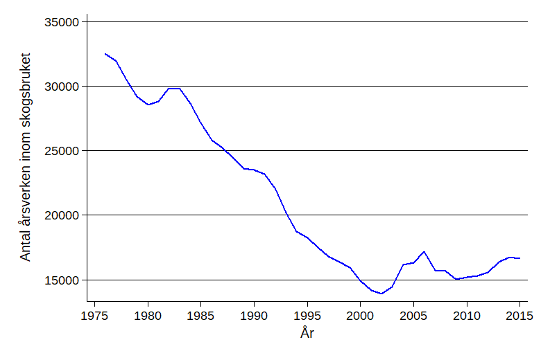 Antal årsverken, AWU (Annual Working Units), totalt antal arbetade timmar i skogsarbete delat med 1 800 timmar. Medeltal för tre-årsperioder. Åren i grafen markerar mitten-året för perioderna.